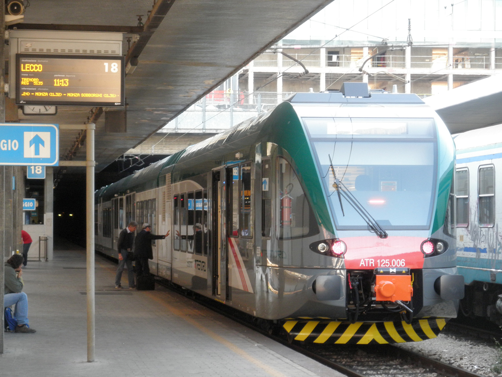 Autotreno ATR 125 di Trenord in partenza da Milano Porta Garibaldi per Lecco